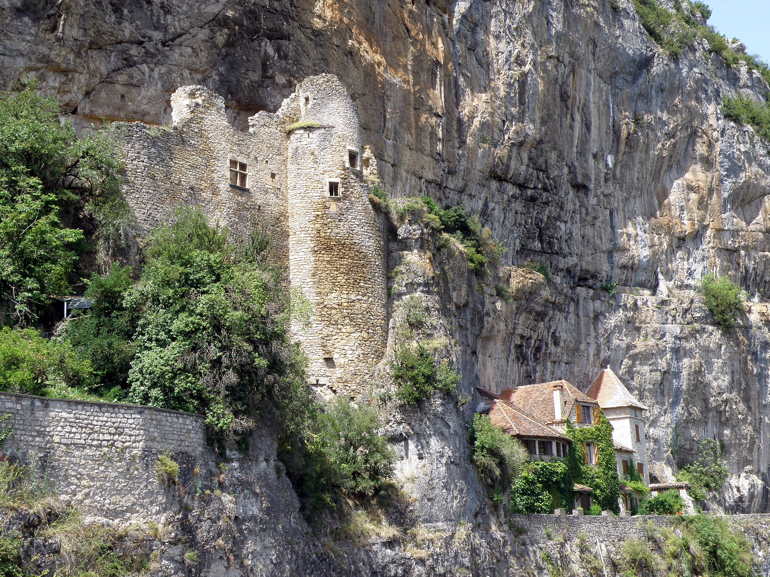 Cabrerets, commune et village dans le département du Lot (région Midi-Pyrénées, France), situés sur le Célé, affluent droit du Lot, à une vingtaine de km (à vol d’oiseau) à l’est-nord-est de Cahors. Ruines du château troglodyte dit des Anglais ou du Diable, adossé à la falaise de Rochecourbe, sur la rive droite de la rivière Célé (coulant en contrebas, non visible), à peu de distance en amont du village.